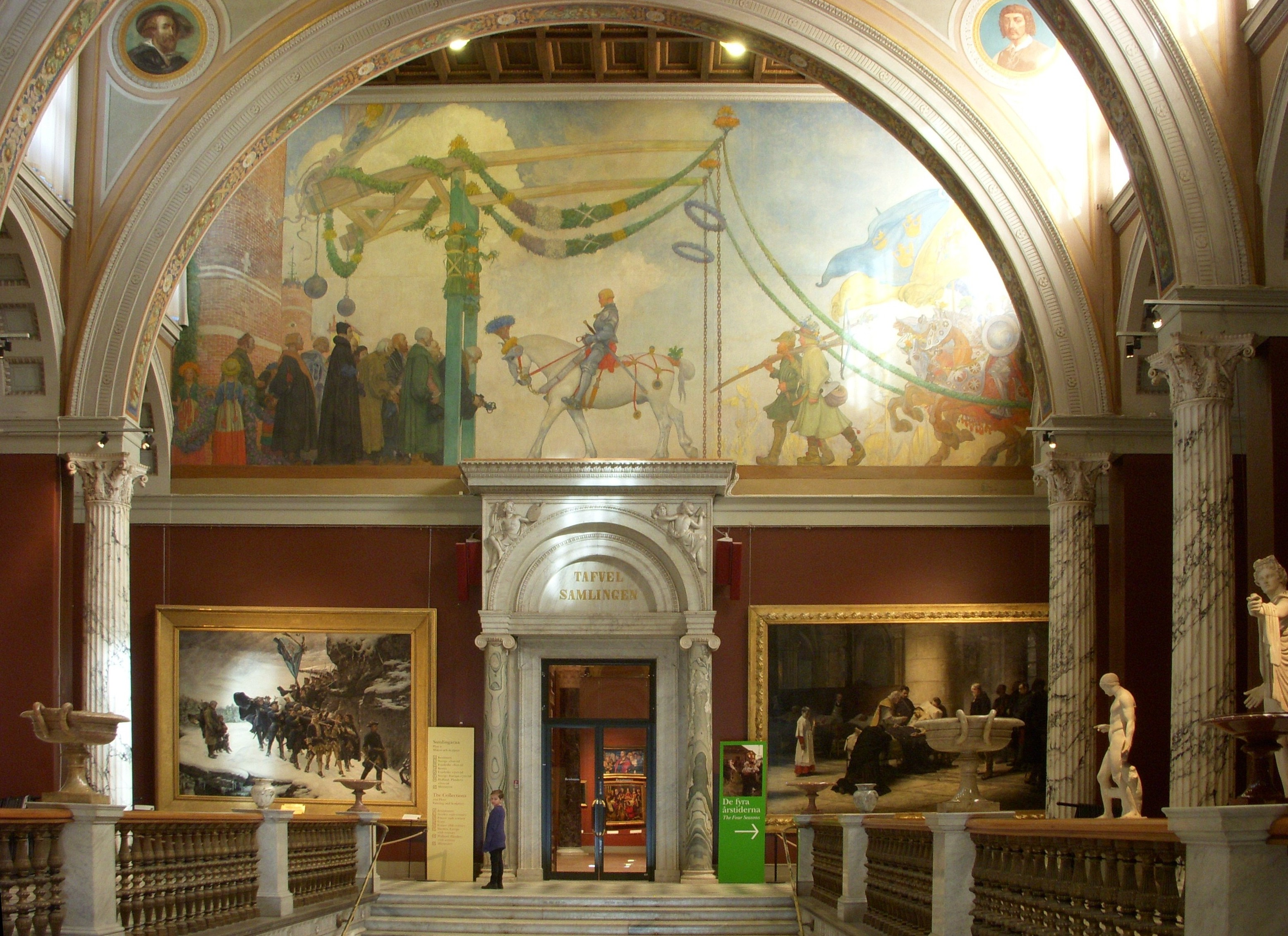 Trapphall i Nationalmuseum i Stockholm med "Gustav Wasas intåg i Stockholm" av Carl Larsson.